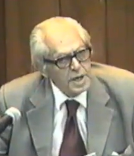 Adolfo Sánchez Vázquez el 21 de octubre de 2003 en la Facultad de Filosofía y Letras de la UNAM durante la conferencia Moral y política I.